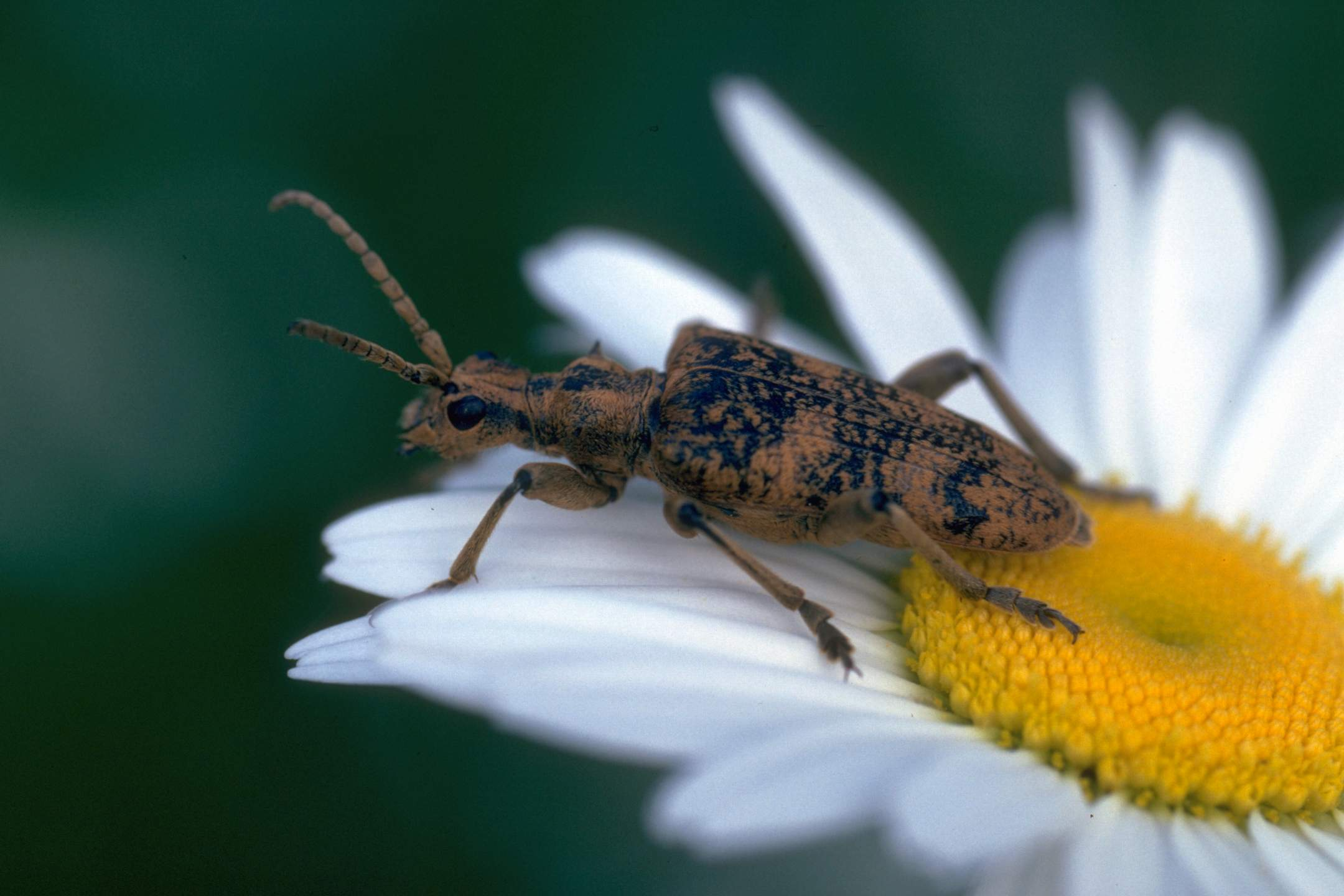 Schrotbock (Rhagium inquisitor) Rhagium sycophanta --Kulac 10:55, 15 March 2007 (UTC)